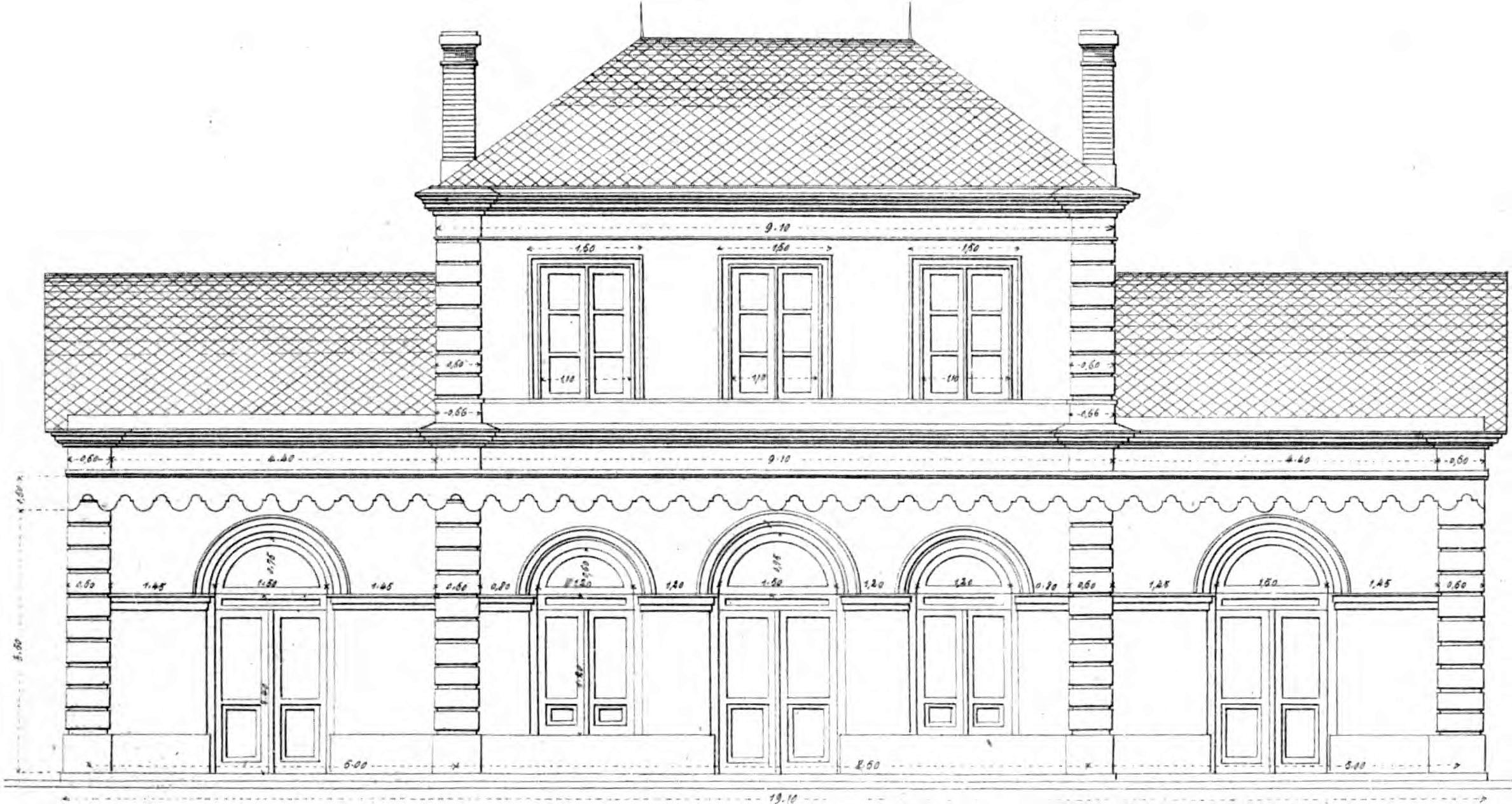 Plan, élévation de la façade du bâtiment voyageurs de la gare de Saint-Mathurin. Architecte Lachèze pour la Compagnie du PO vers 1852.